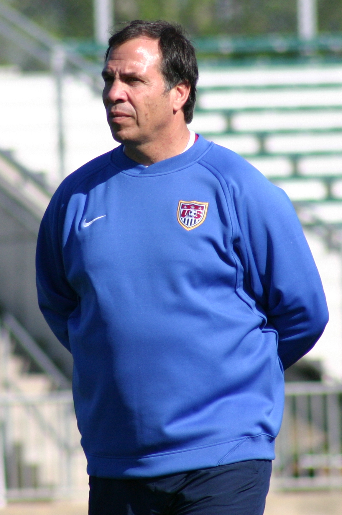 Bruce Arena, during USMNT practice